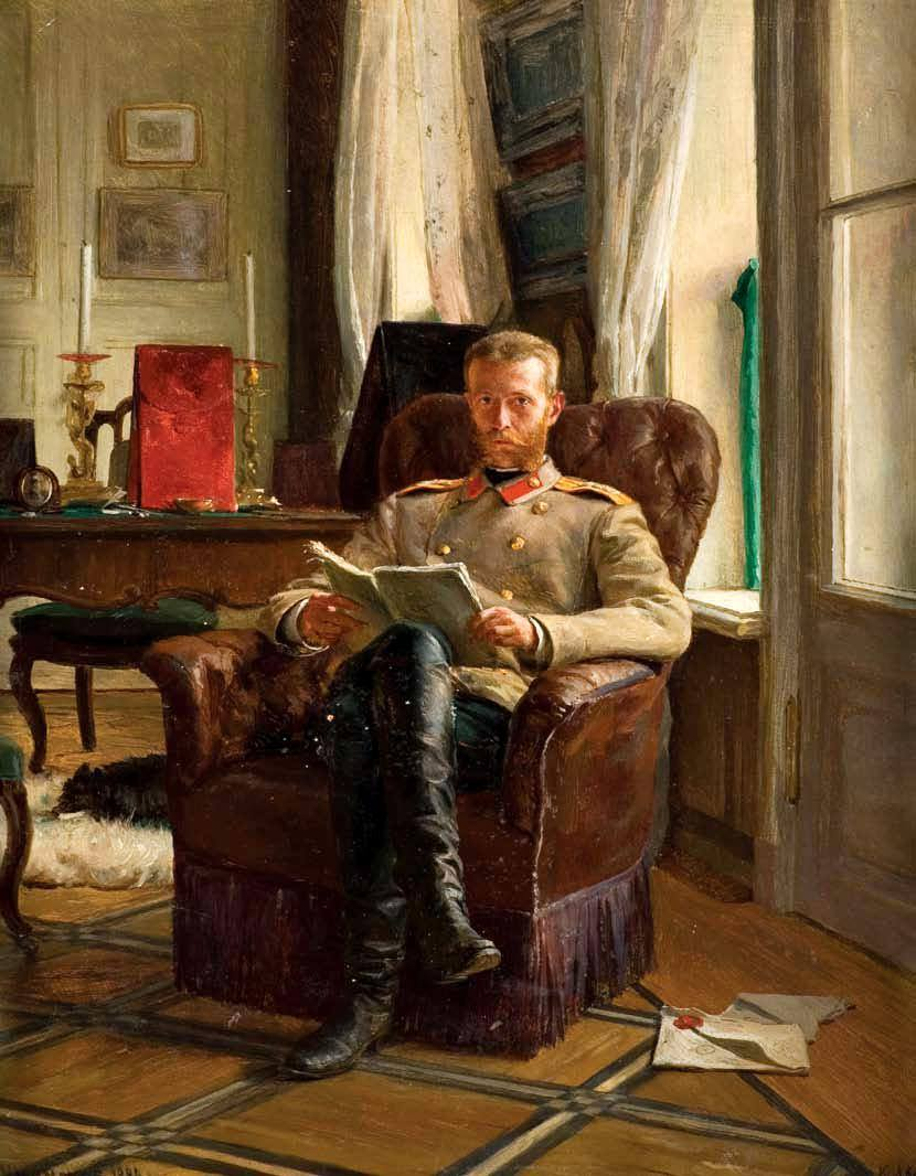 «За чтением. Портрет великого князя Сергея Александровича Романова». К. Лемох, 1886 г.» Из коллекции Фонда содействия возрождению традиций милосердия и благотворительности «Елисаветинско-Сергиевское просветительское общество» (ЕСПО). Портрет был создан в 1886 году известным живописцем Карлом Викентьевичем Лемохом. На портрете К.В. Лемоха великий князь Сергей Александрович изображен в своем кабинете в усадьбе Ильинское под Москвой.